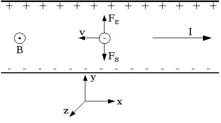 אילוסטרציה של אפקט הול (עבור נושאי מטען שלילי) רישיון נוצר על ידי משתמש:Adiel lo